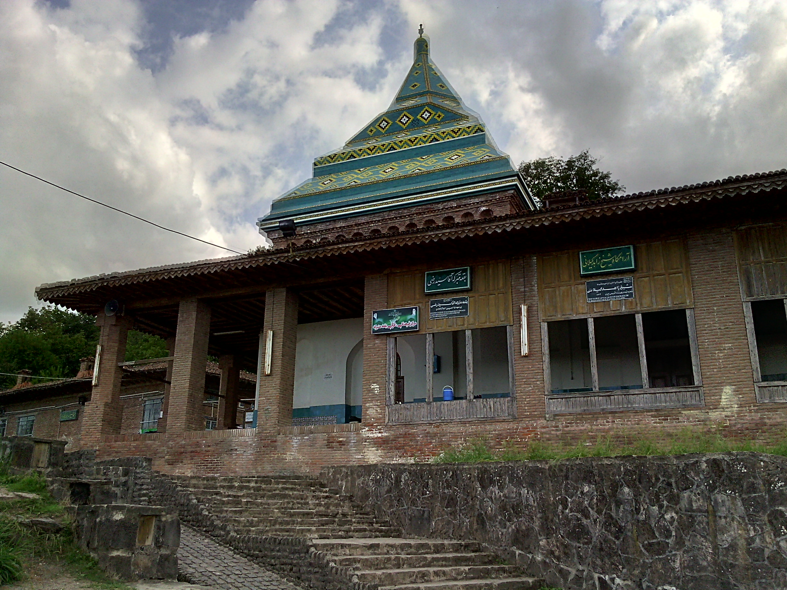 بقعه شیخانور (شیخ زاهد گیلانی)